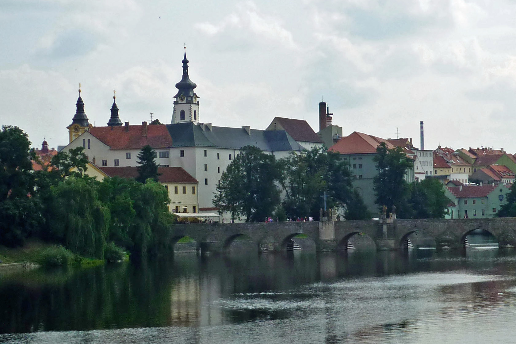 Steinerne Brücke in Pisek - älteste Steinbrücke Böhmens